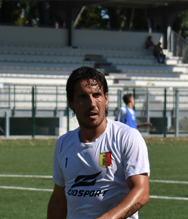 Federico Del Grosso in allenamento